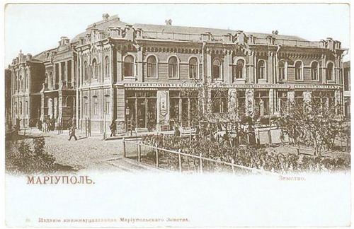 поштова листівка. Маріуполь Повітова Земська управа